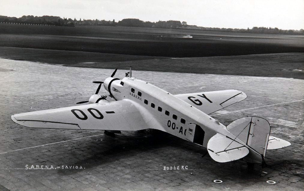 Aereo Savoia Marchetti S-73P C-N